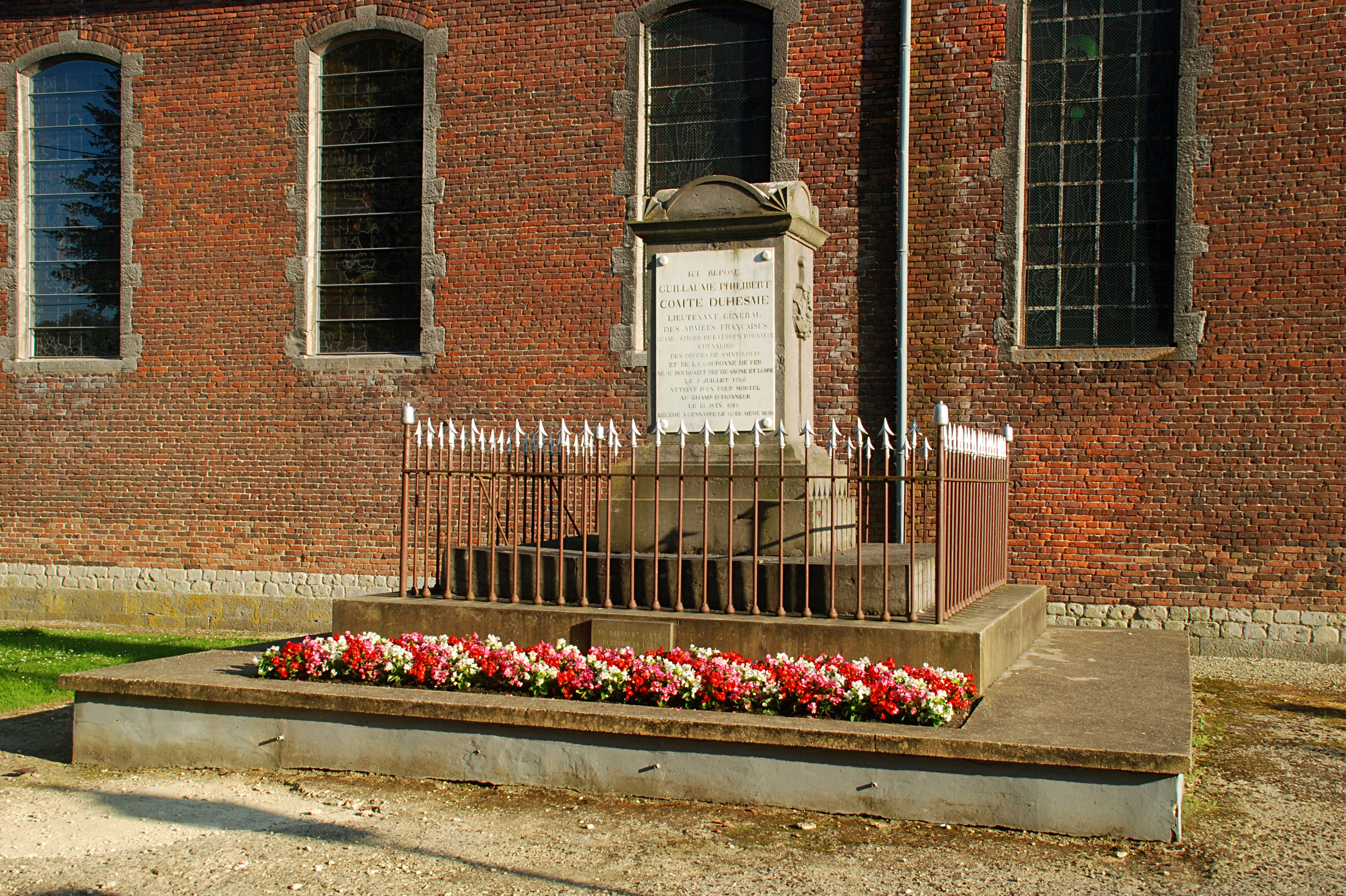 Belgique - Brabant wallon - Genappe - Ways - Mausolée Duhesme (tombe du Général Duhesme, mort des suites des blessures encourues à la bataille de Waterloo)